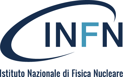 Nuova versione del logo 2017